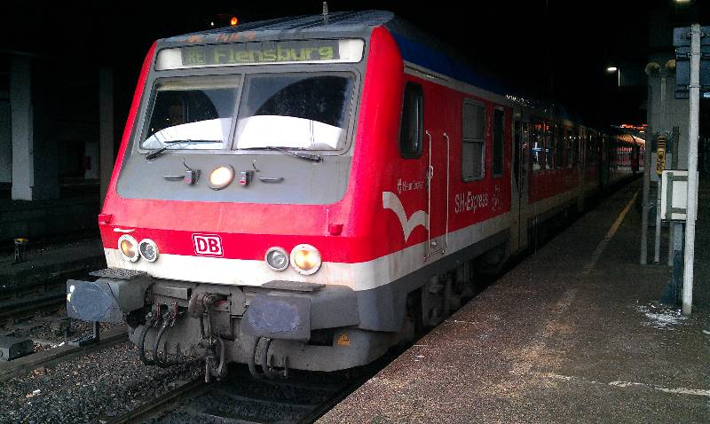 Steuerwagen des SH-Express in Hamburg Hbf